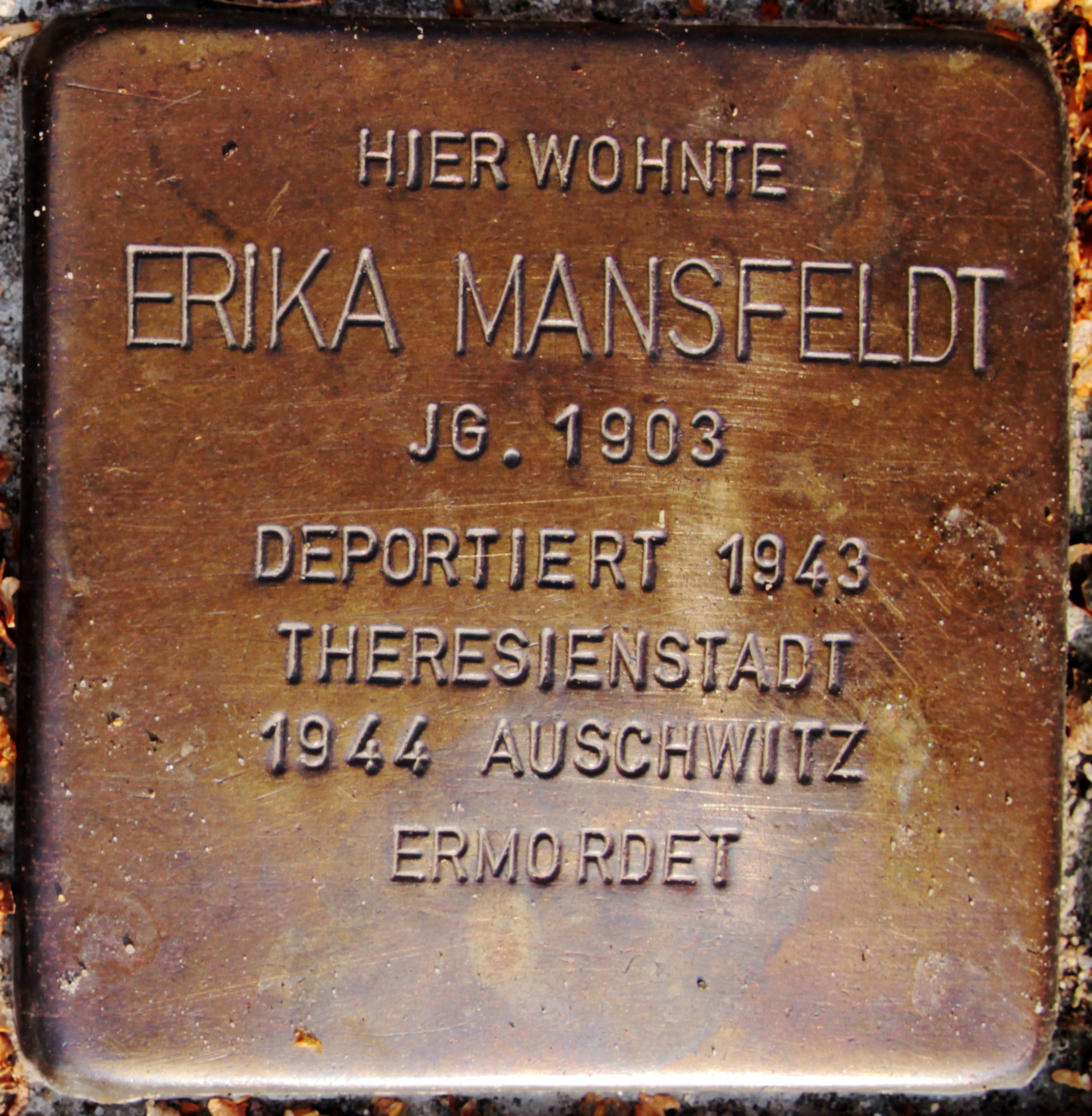 Stolperstein für Erika Mansfeldt im Heckkatenweg 2 in Hamburg-Bergedorf am 17. August 2020